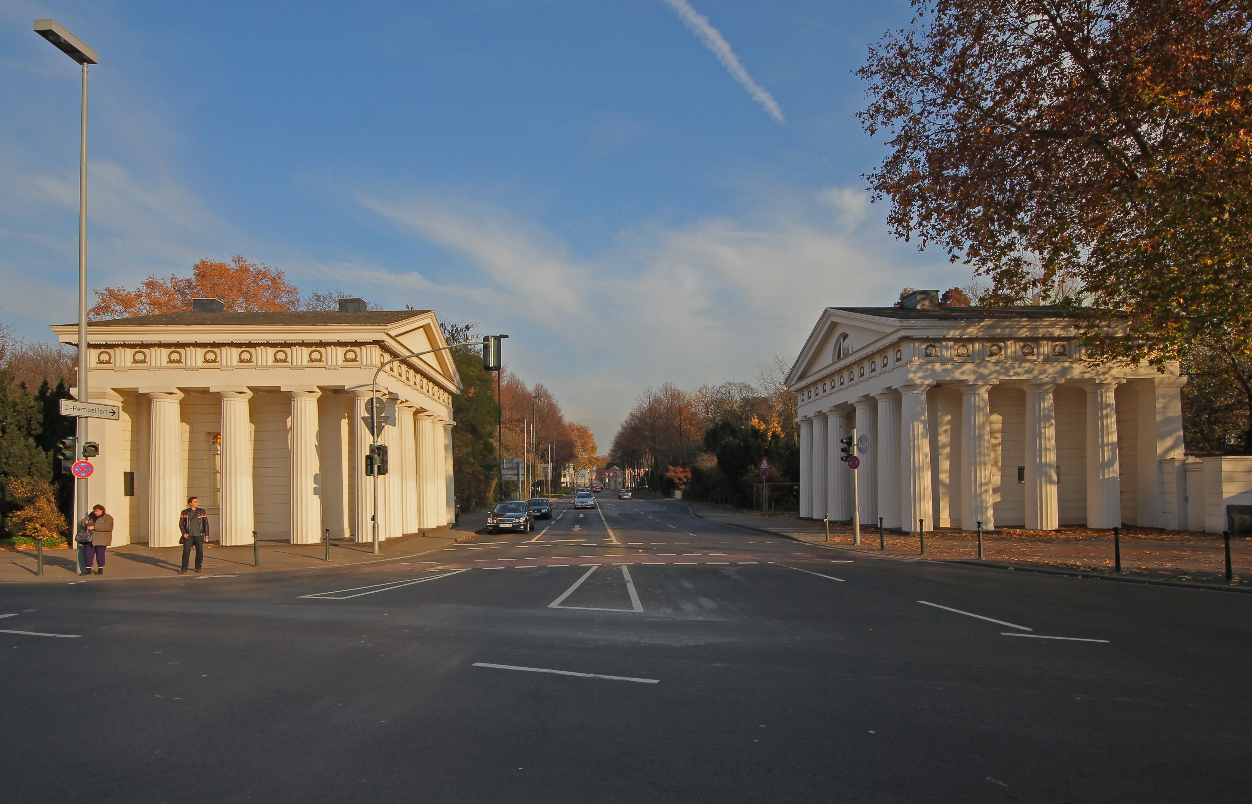 Düsseldorf-Pempelfort, Ratinger Tor